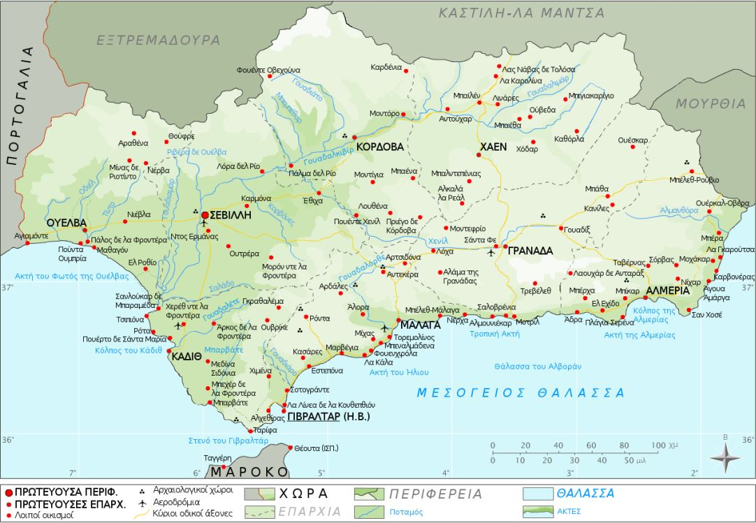 Χάρτης της Ανδαλουσίας